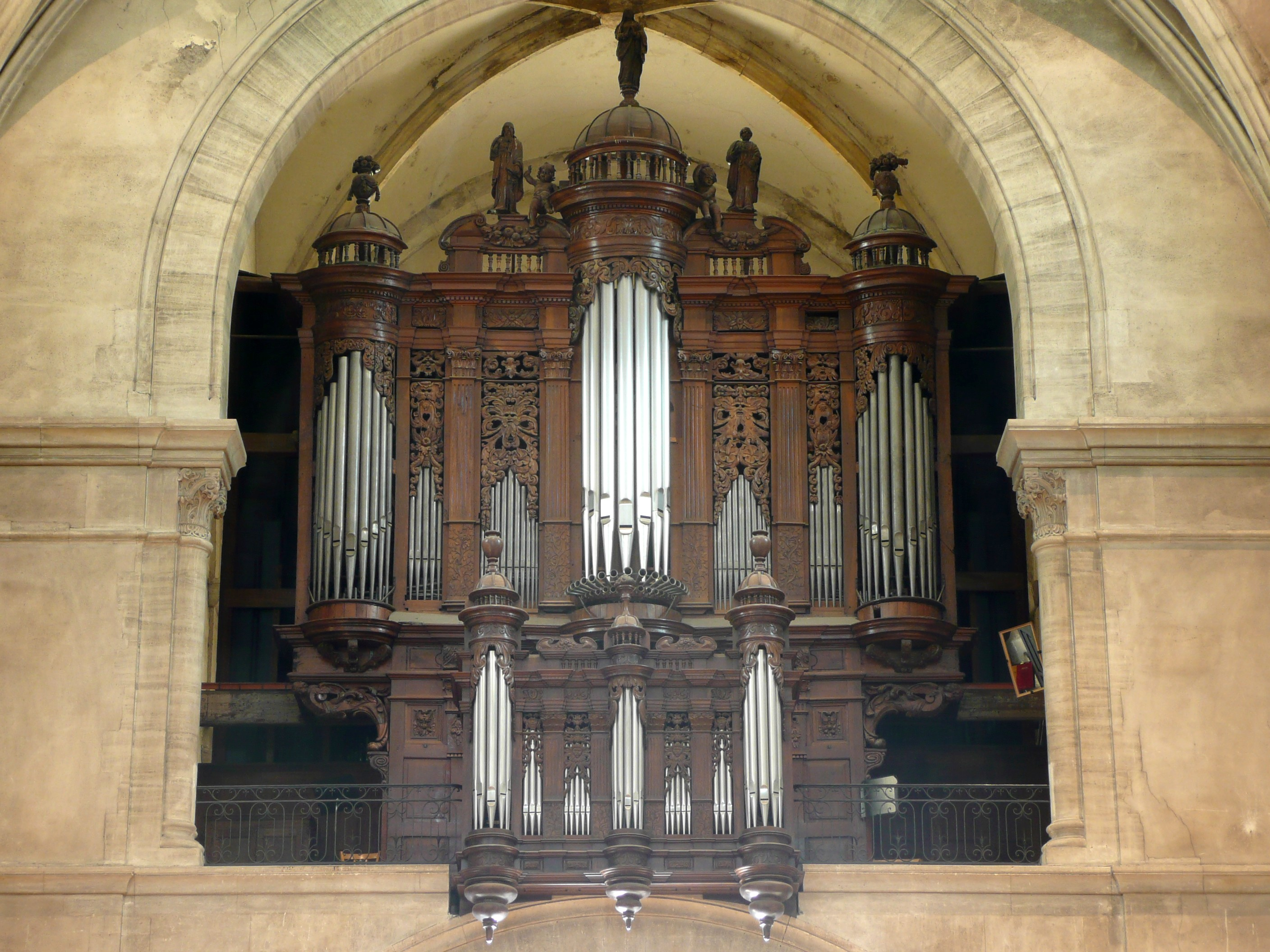 A Nîmes (Gard, France), dans la cathédrale Notre-Dame-et-Saint-Castor, buffet d'orgue de Gaspard et André Eustache en 1643, contenant un orgue d'Alfred Kern de 1982.